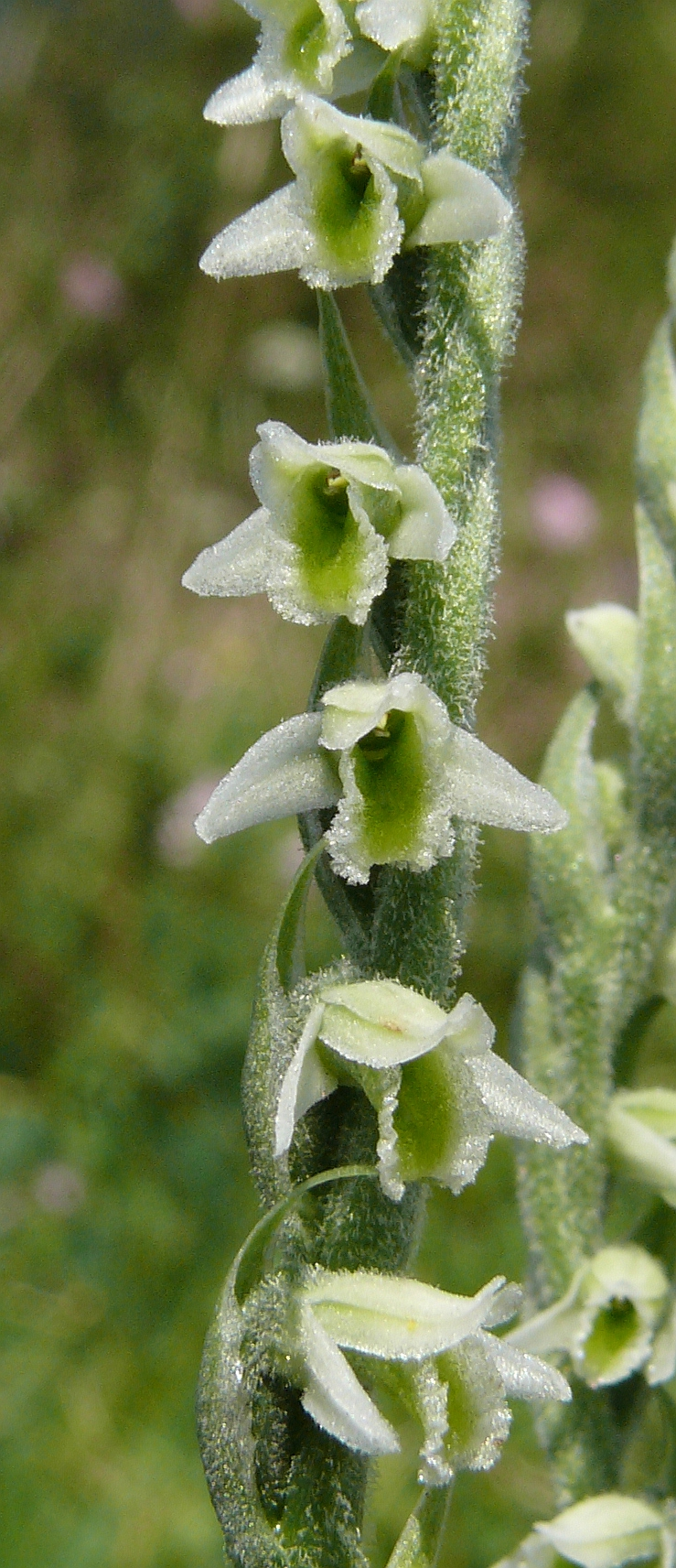 Spiranthes spiralis, Frankenhöhe, Germany